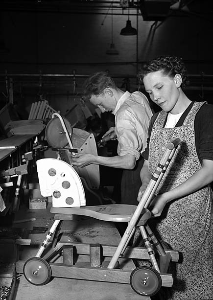 Teitl Cymraeg/Welsh title: Ffatri Brodyr Lines ym Merthyr Tudful Ffotograffydd/Photographer: Geoff Charles (1909-2002) Dyddiad/Date: June 22, 1951 Cyfrwng/Medium: Negydd ffilm / Film negative Cyfeiriad/Reference: (gch01962) Rhif cofnod / Record no.: 3368246 Rhagor o wybodaeth am gasgliad Geoff Charles yn Llyfrgell Genedlaethol Cymru More information about the Geoff Charles Collection at the National Library of Wales